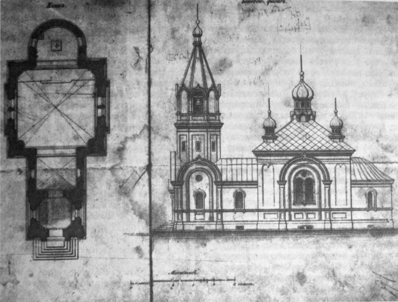 Беларуская (тарашкевіца): Вязавец (Viazaviec). Царква-мураўёўка, праект